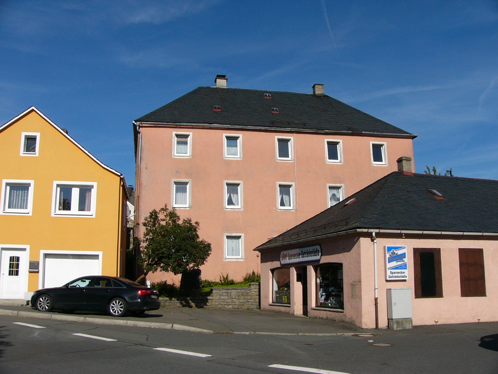 Denkmalgeschützte Gebäude in Sparneck